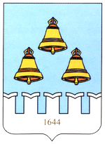 Герб города Далматово (Курганская область) (2004 г.)